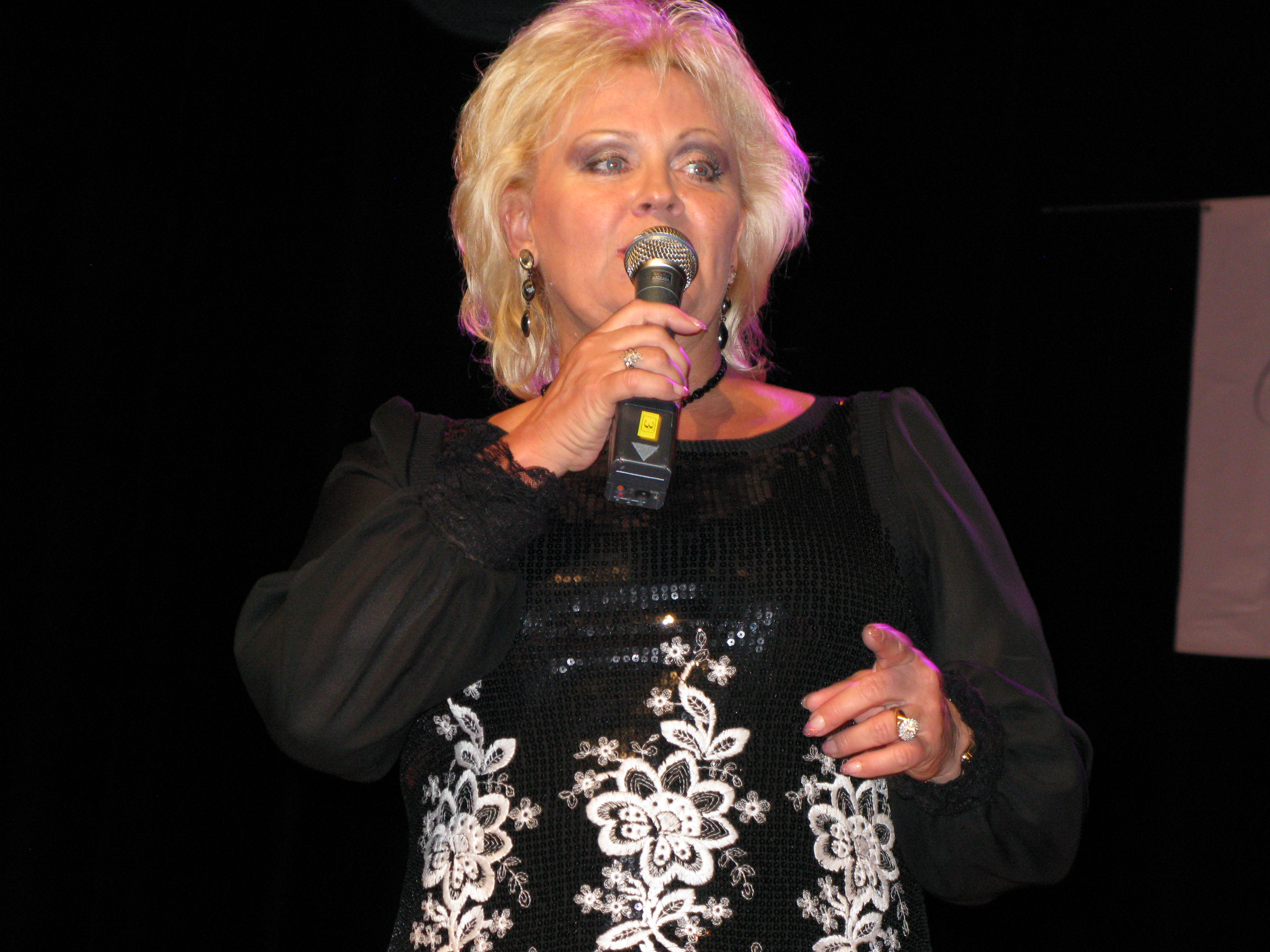 Estraadilaulja Anne Veski